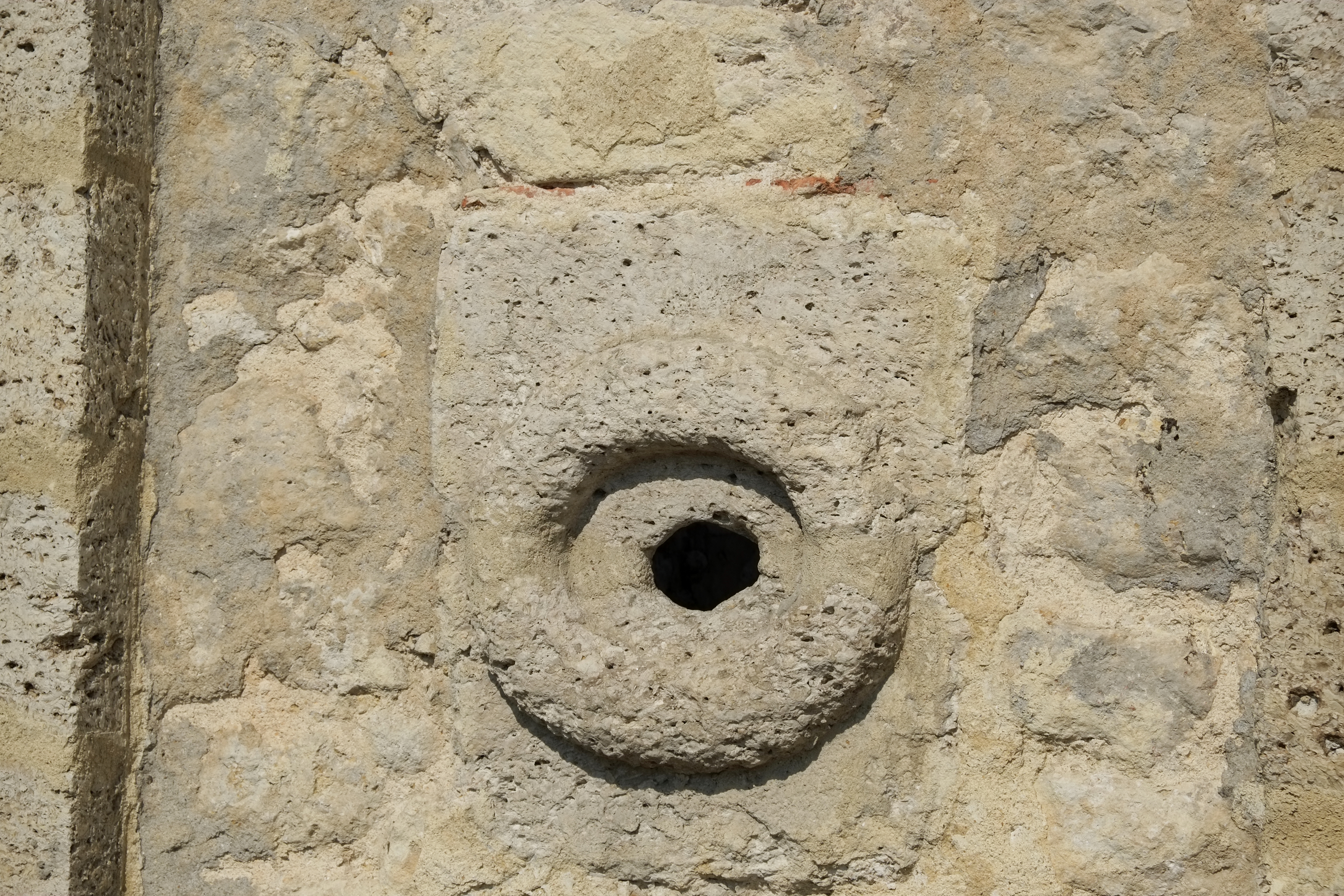 Ehemaliges Schloss in Beaumont-du-Gâtinais (Frankreich)